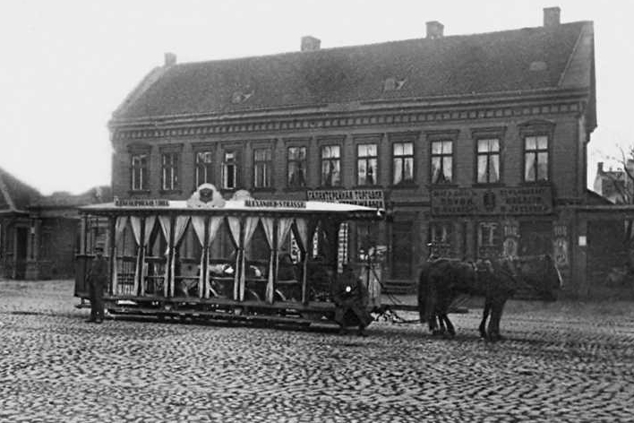 Zirgu tramvajs Aleksandra (Brīvības) un Cēsu ielu krustojumā ap 1900. gadu